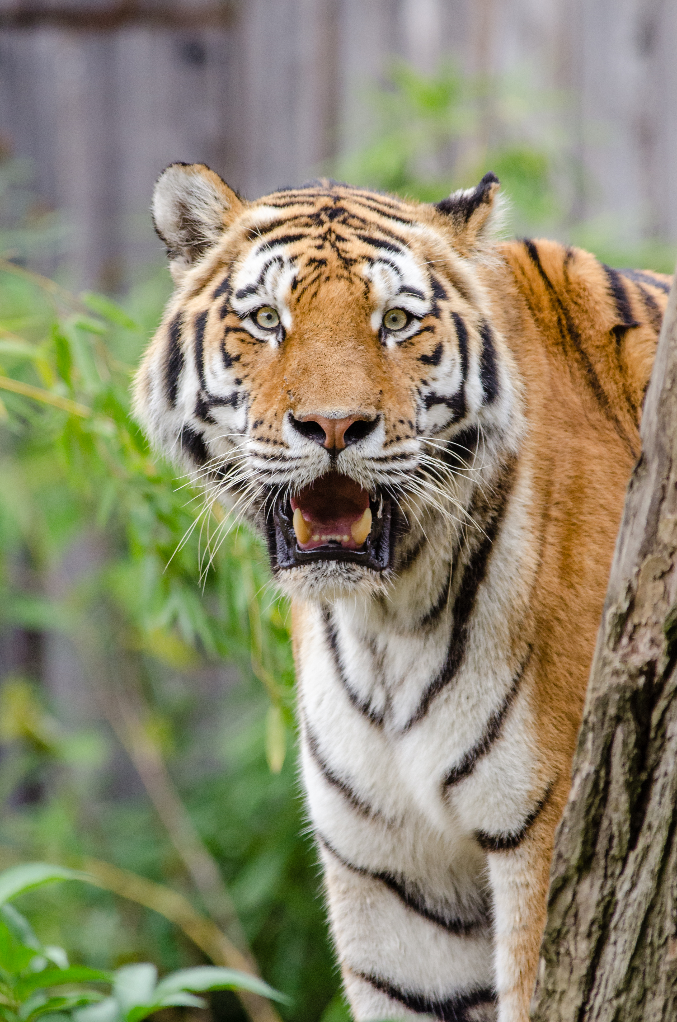 Siberian Tiger